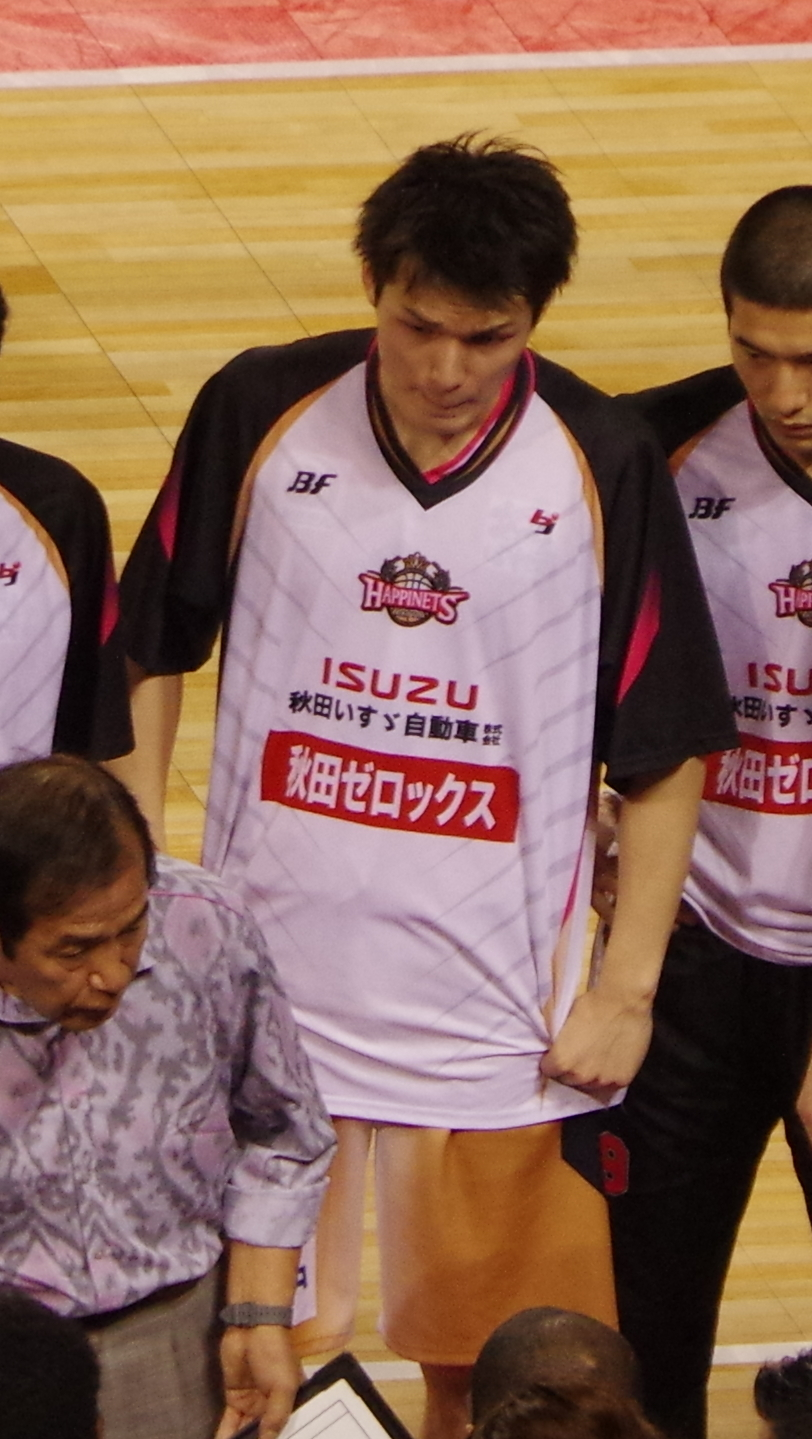 ｂｊリーグ 2013-2014シーズン プレイオフ ファイナルズ_026